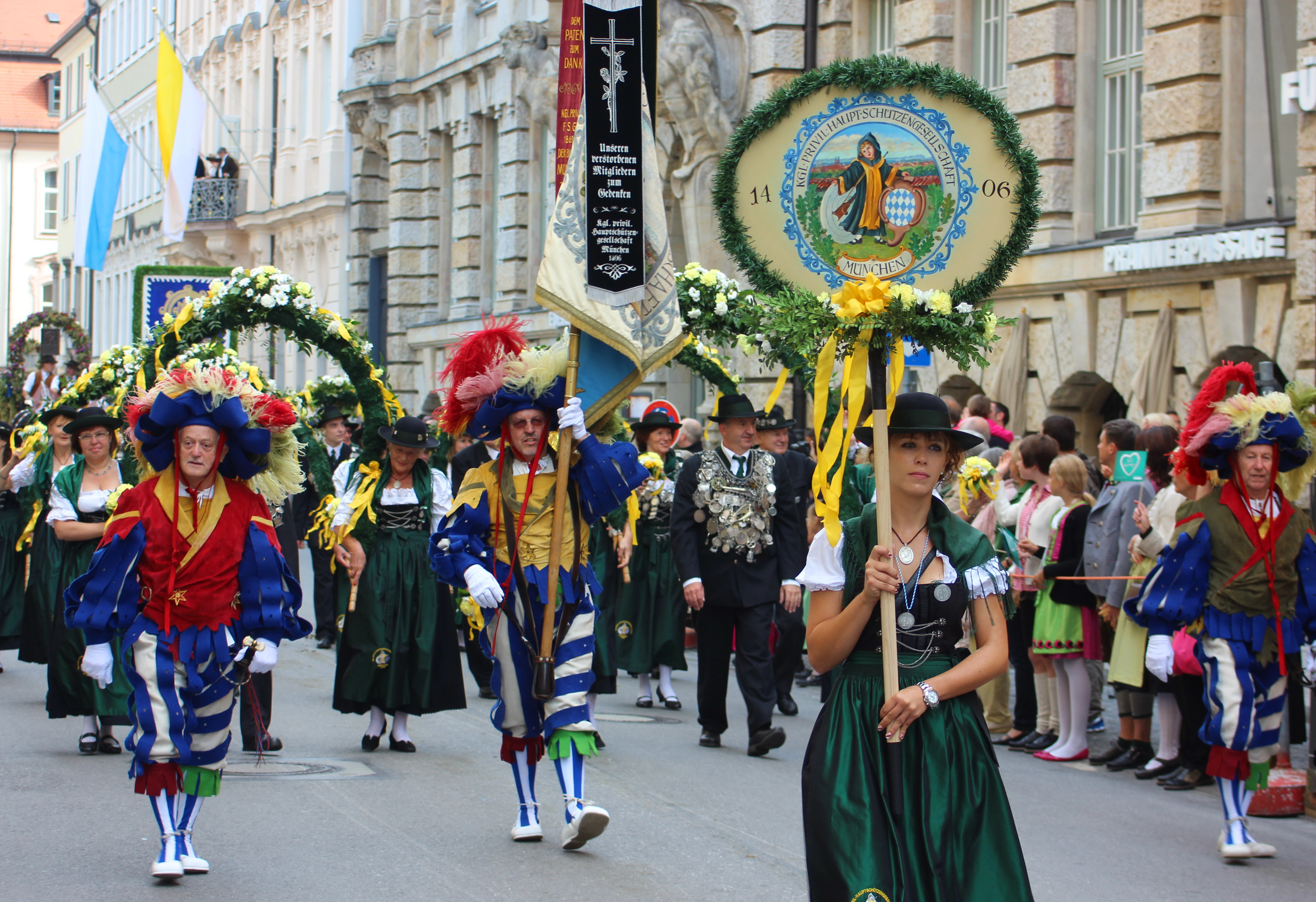 Münchner Teilnehmer auf dem Trachten- und Schützenzug in München am ersten Oktoberfestsonntag.